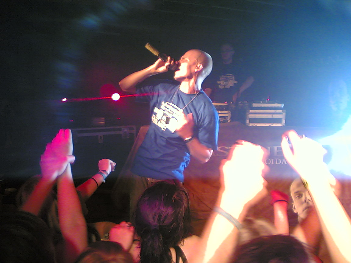 Elastinen @ Cotton Club Kuopio 21.12.2006